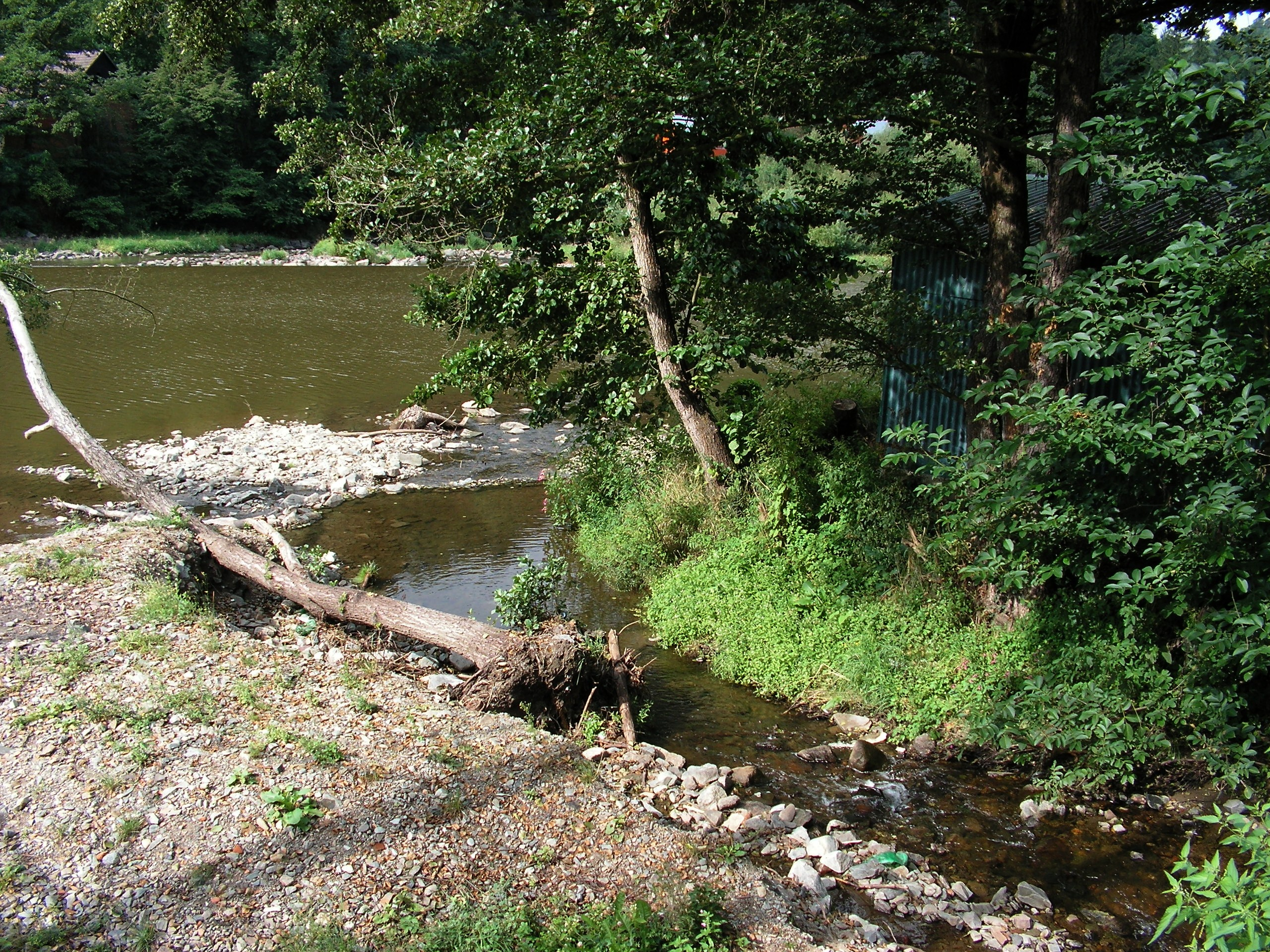 Ústí Chotouňského potoka do řeky Sázavy v osadě Žampach v okrese Praha-západ